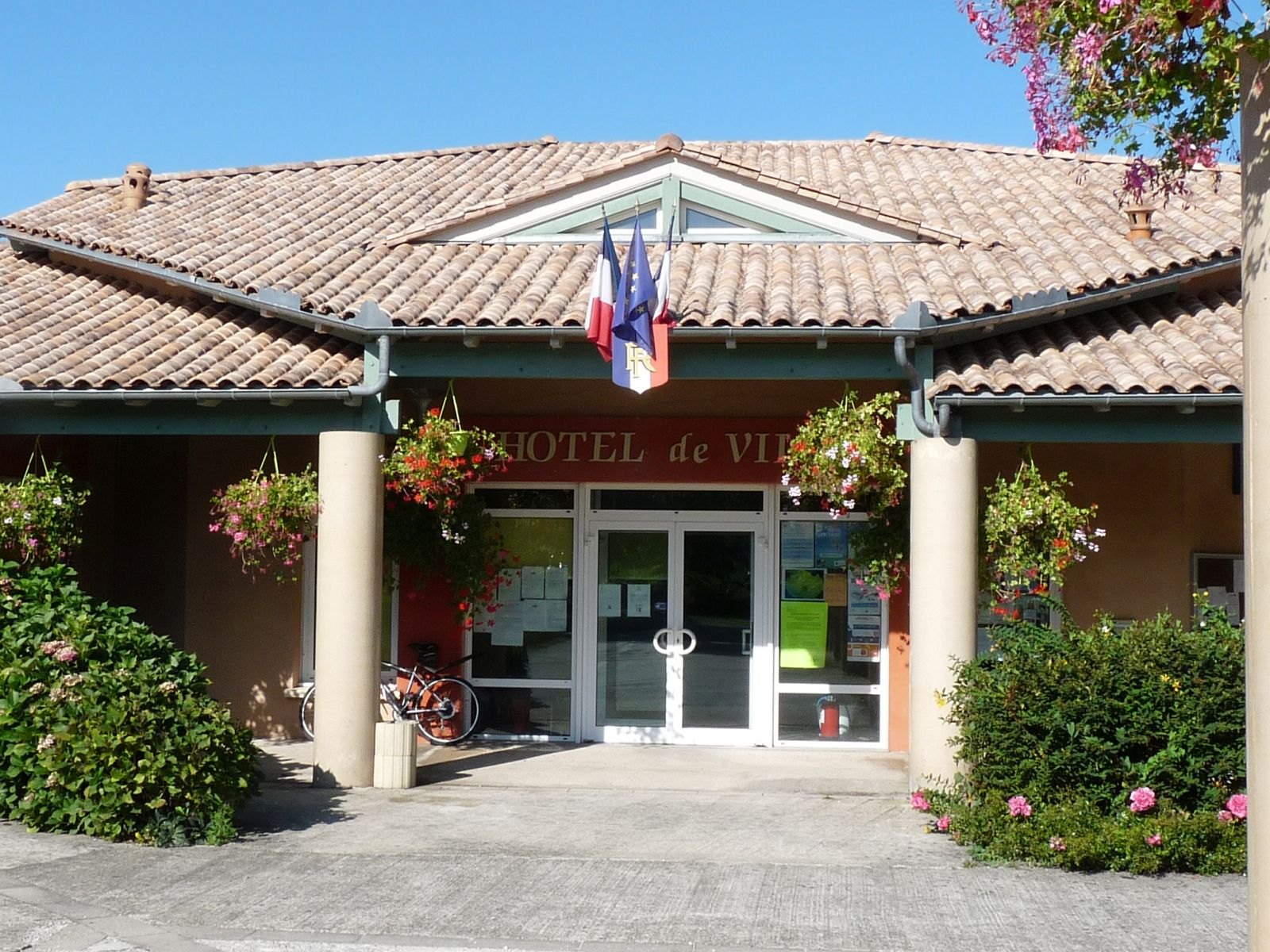 Mairie de Peujard, Gironde, France